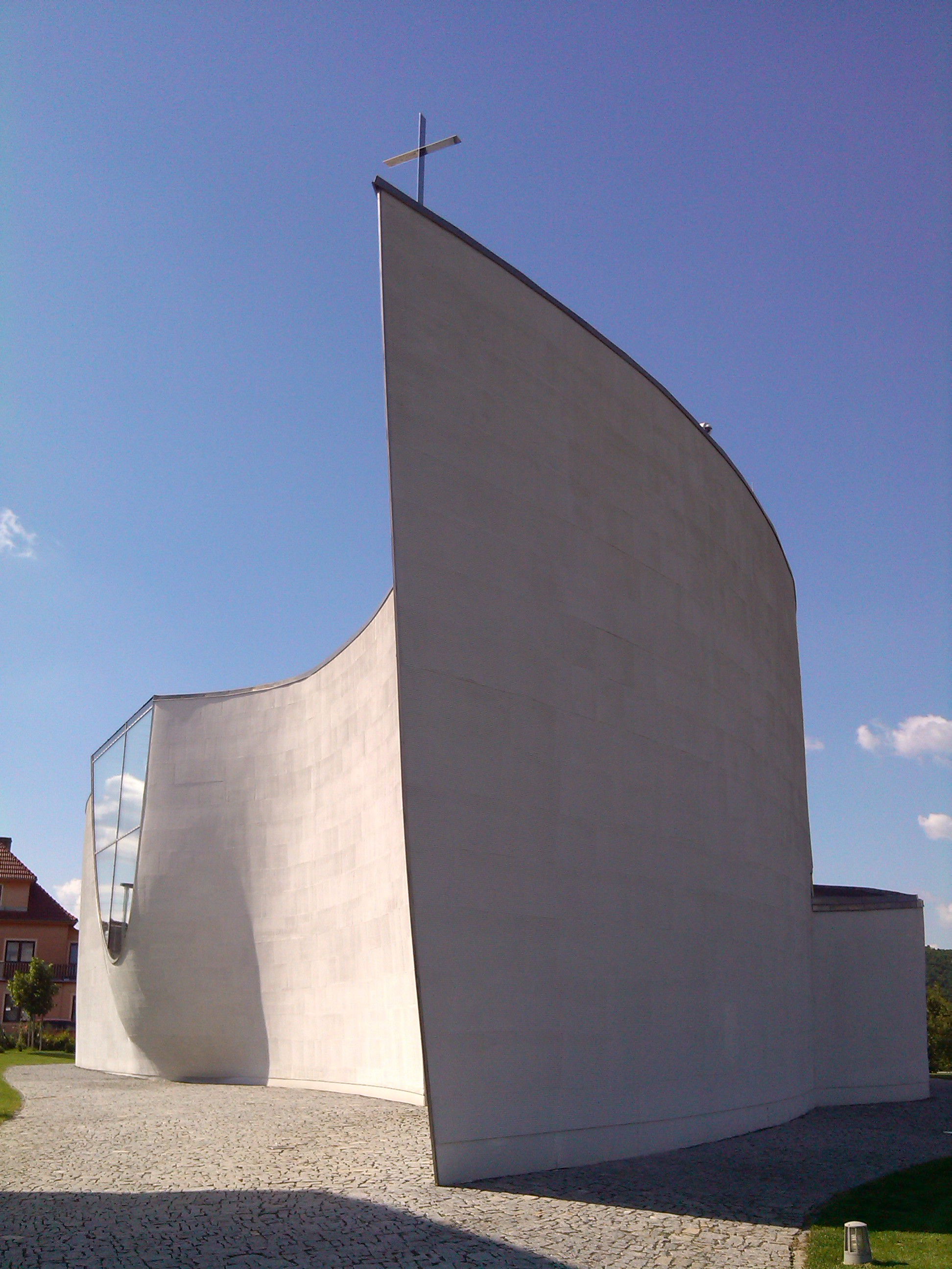 Modlitebna Církve bratrské v Černošicích podle projektu arch. Zdeňka Fránka.